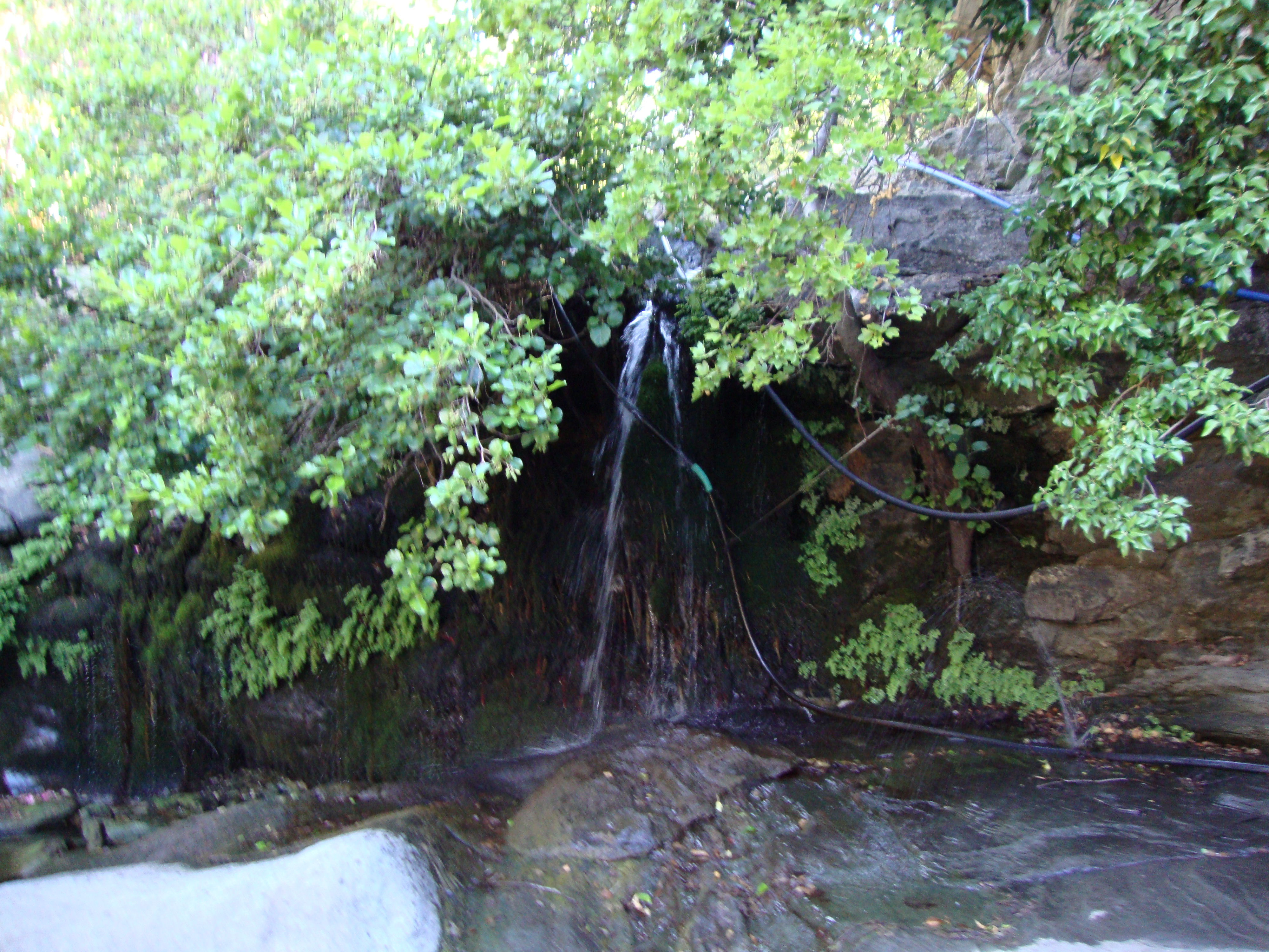 Καταρράκτες Πιθάρας, Αποίκια Άνδρου